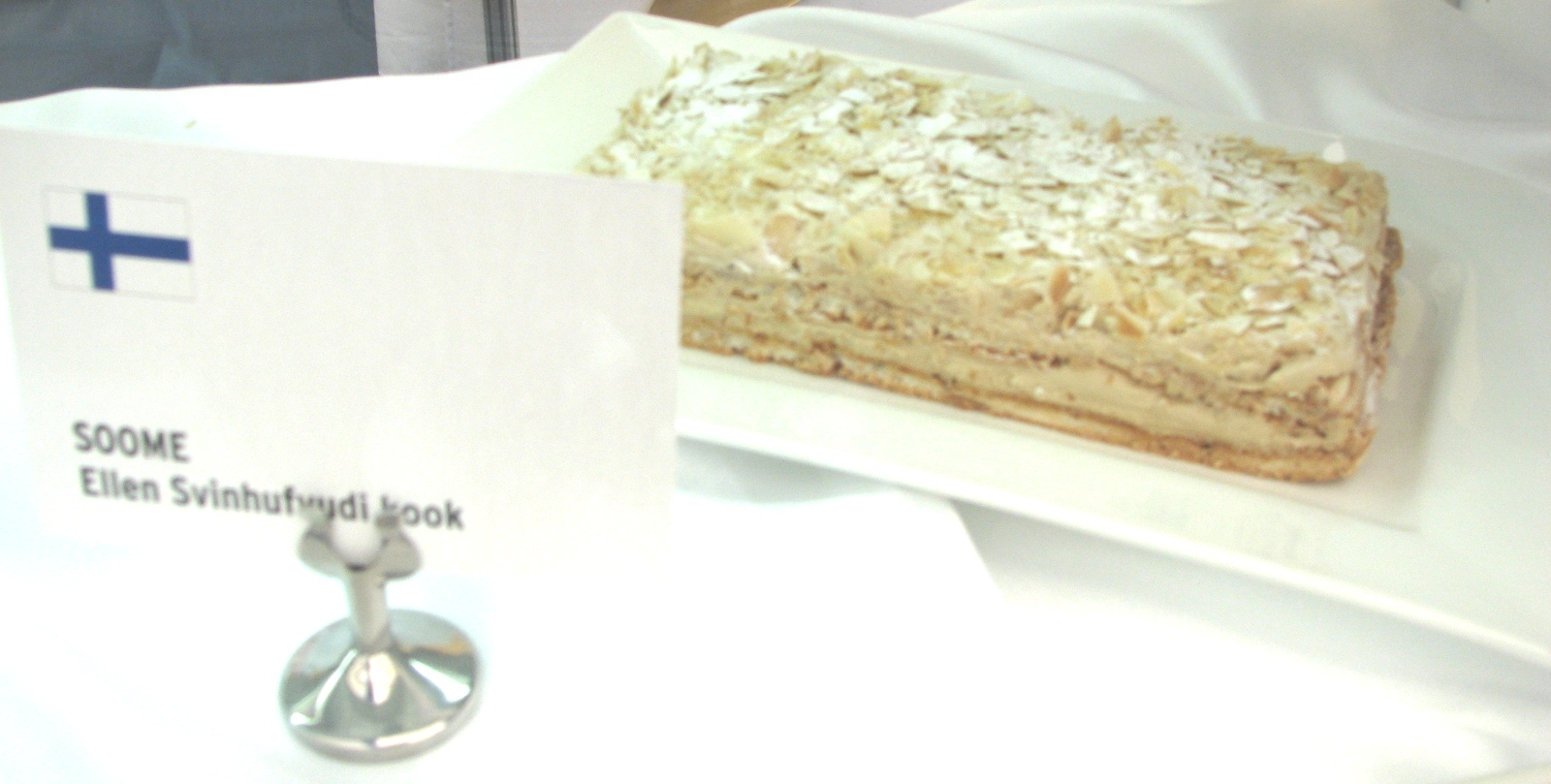 Ellen Svinhufvudi kook Euroopa kohvikus Euroopa päeva tähistamisel Vabaduse väljakul